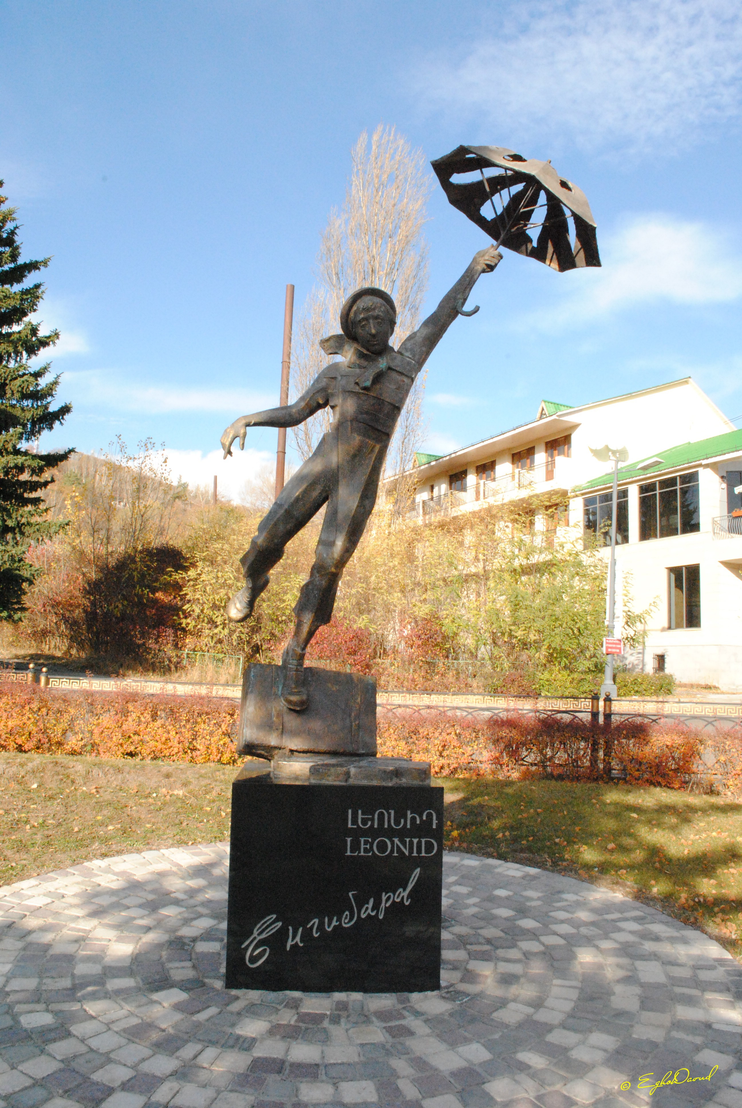 ք. Ծաղկաձոր